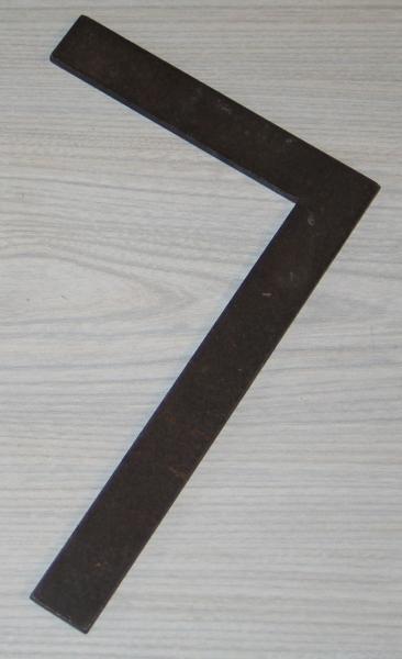 Ein Winkel